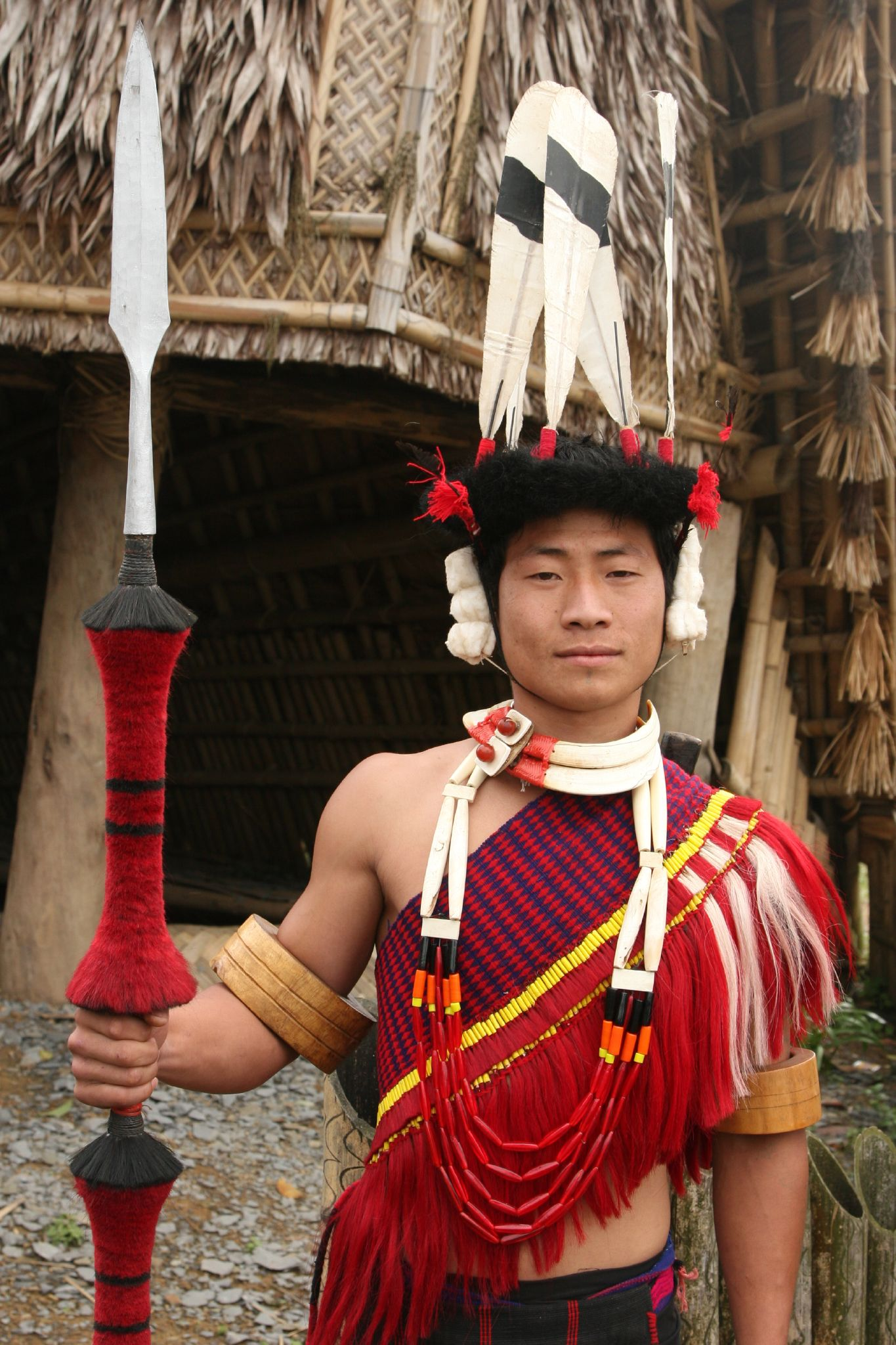 Ao Naga at Chuchuyimlang village. Nagaland India